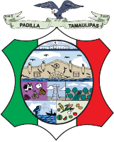 Municipio Ubicado al Centro del Estado de Tamaulipas